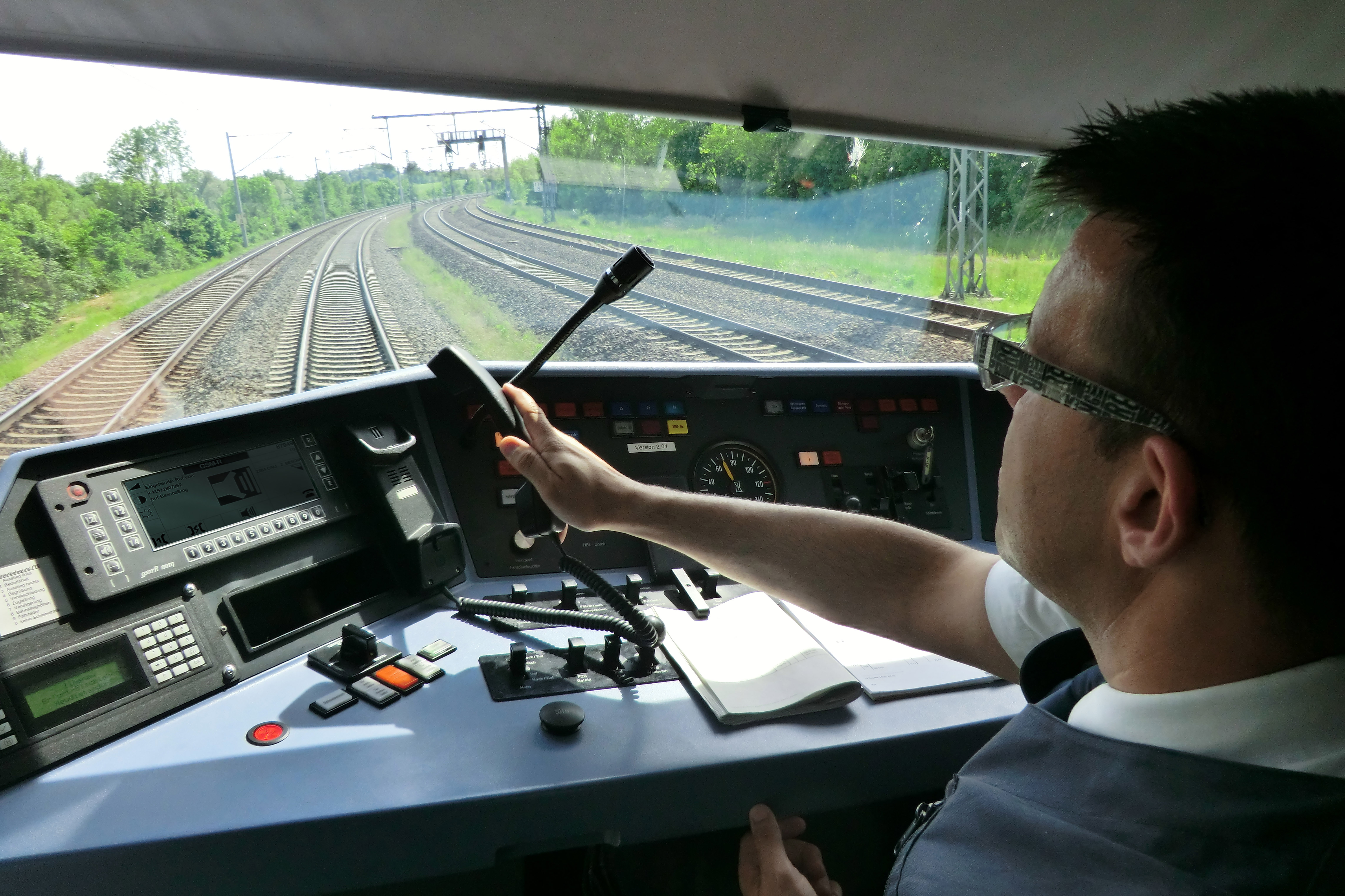 Zugfunkanlage MESA 23 der Funkwerk Systems GmbH